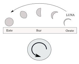 AUTHOR: Francisco Javier Blanco González País: España IMAGE: el movimiento directo de la Luna Image made by Inkscape (.svg to .png by x2y)